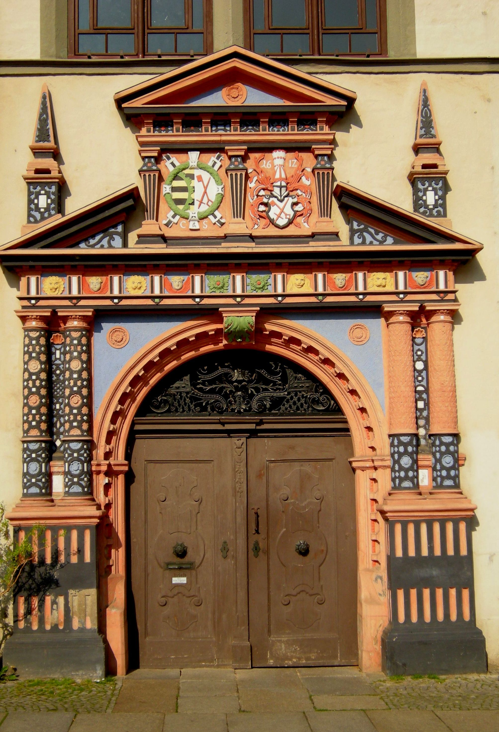 Naumburg - Eingangsportal zum Rathaus.jpg